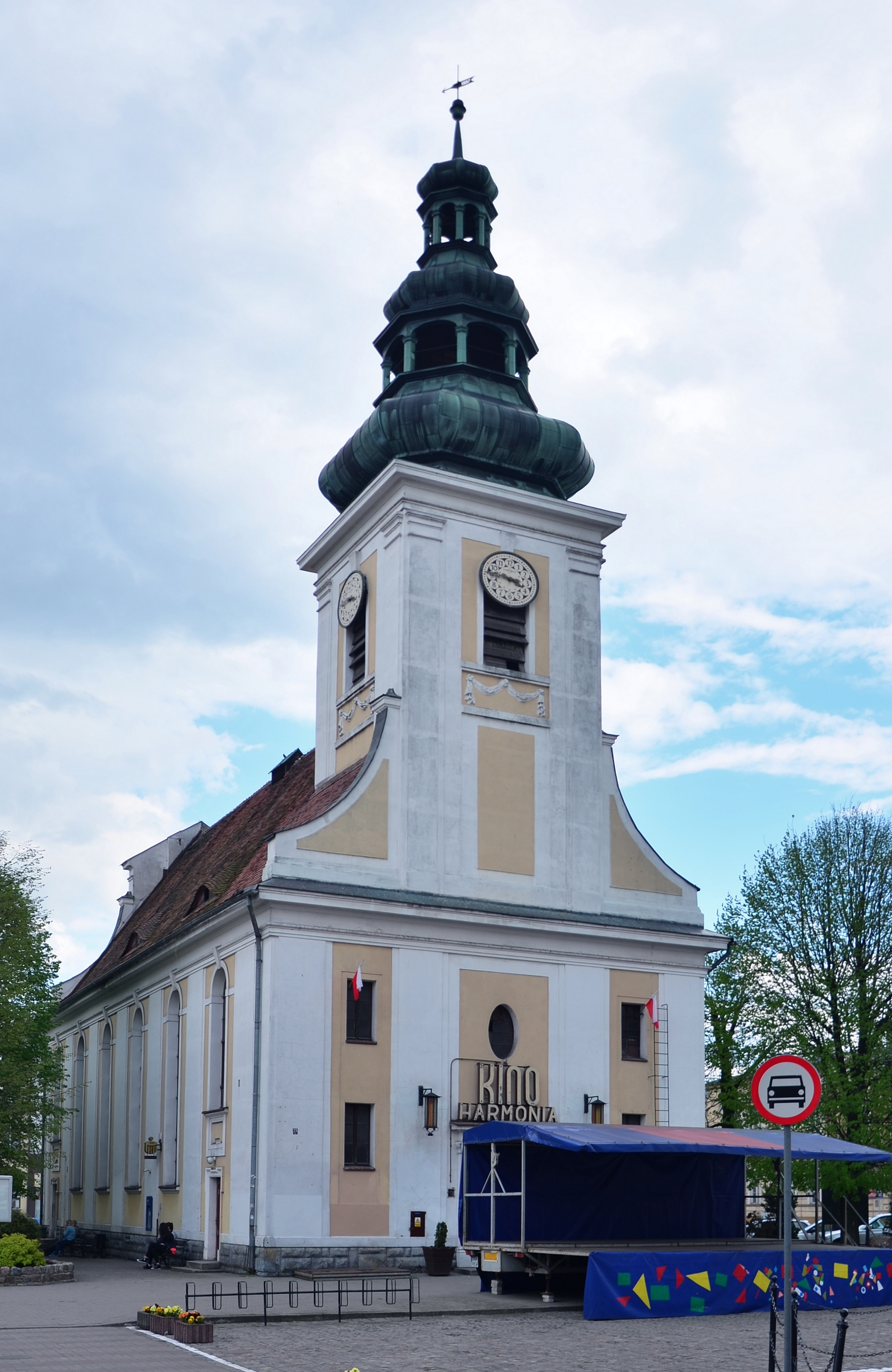 Dawny kościół ewangelicki, 1824-1827